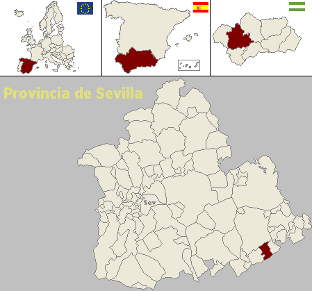 Mapa de localización del municipio sevillano de Los Corrales (Andalucía, España)